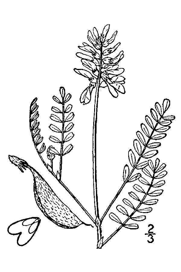 Astragalus alpinus L. - alpine milkvetch